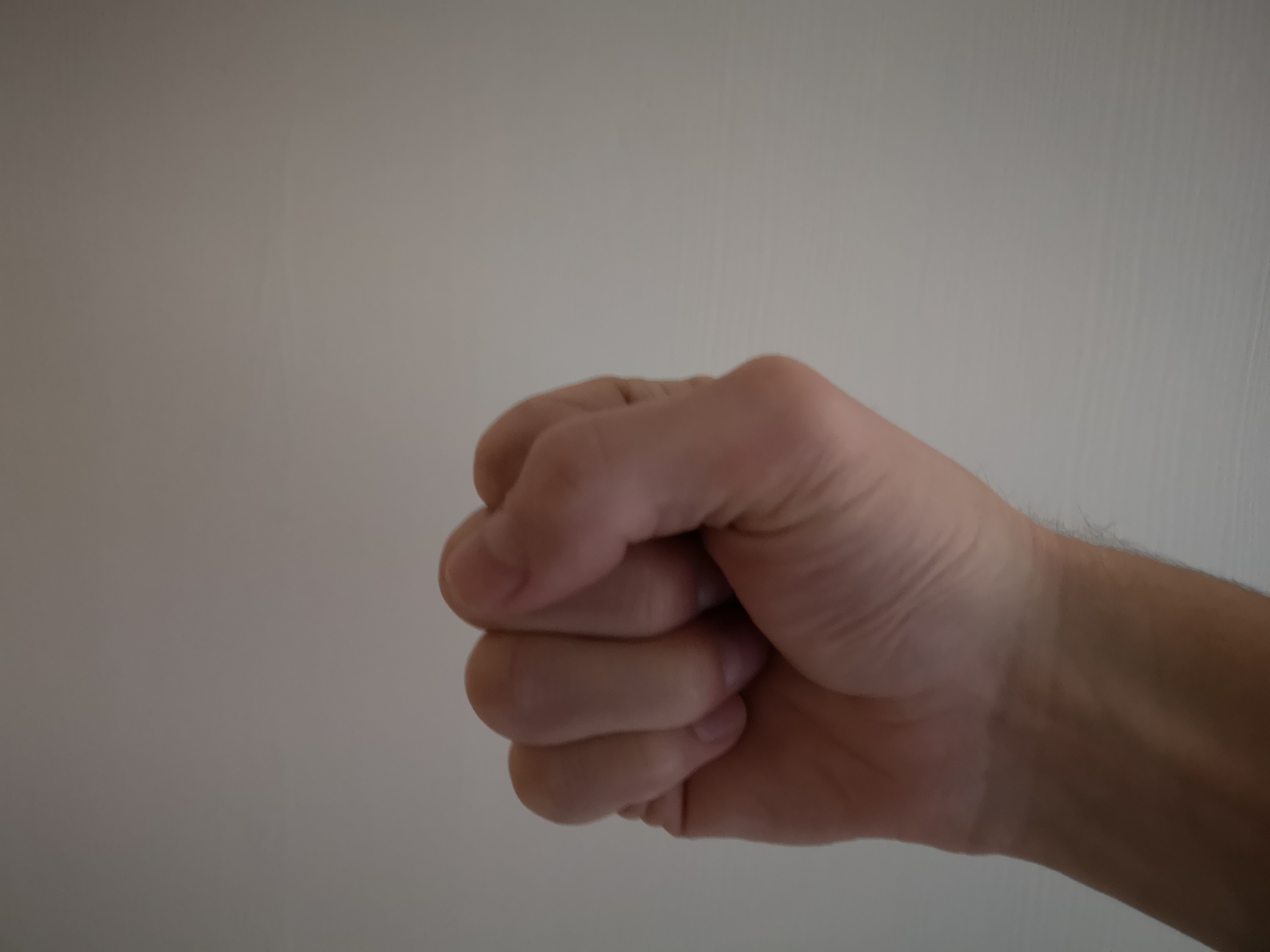 steinhånd